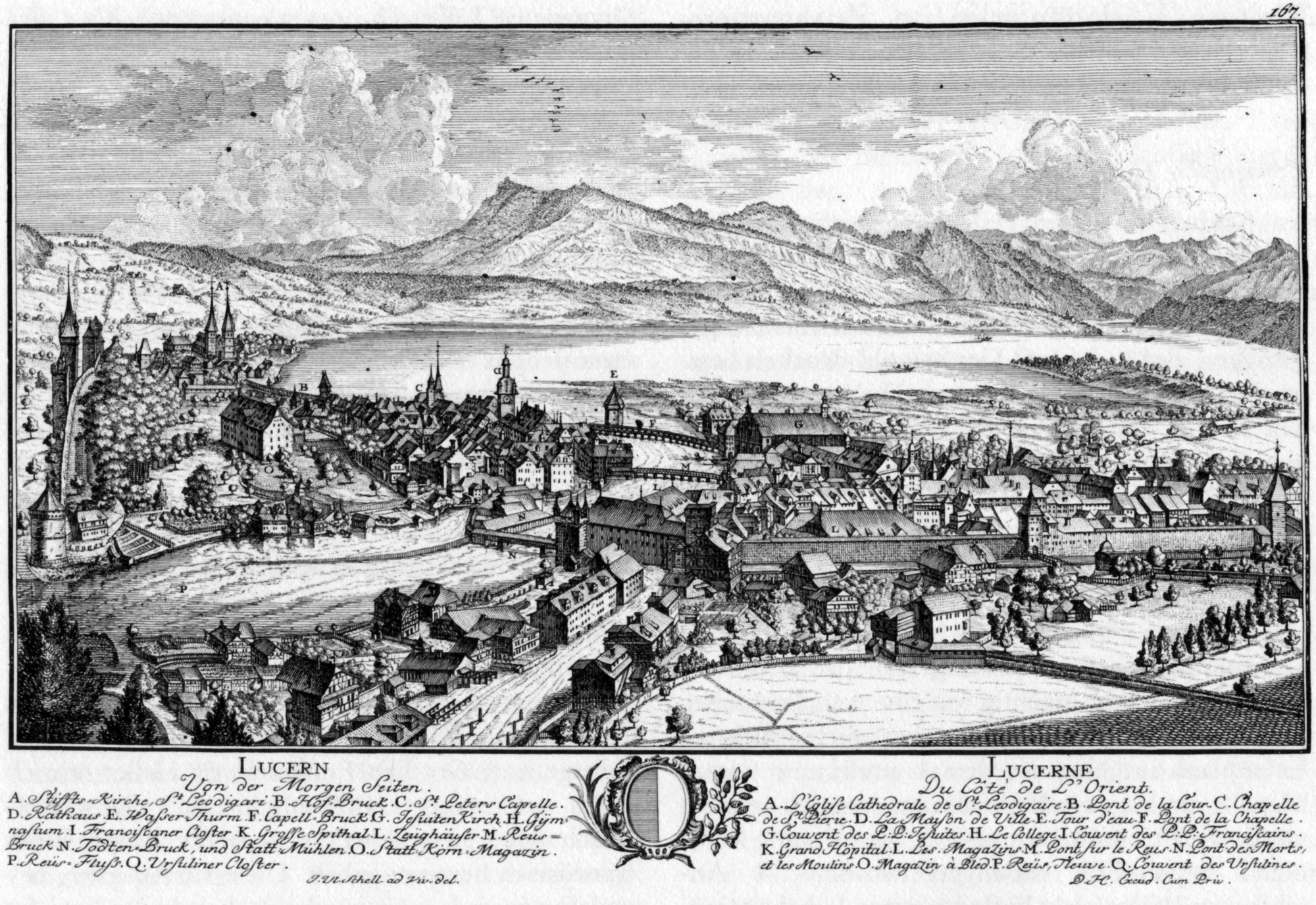 Ansicht der Stadt Luzern ca. 1758. Blatt 167 in der Topographie der Eidgenossenschaft, zweite Lieferung 1758–1762/63, Blatt 167. Stich von David Herrliberger nach einer Zeichnung von Johann Ulrich Schellenberg